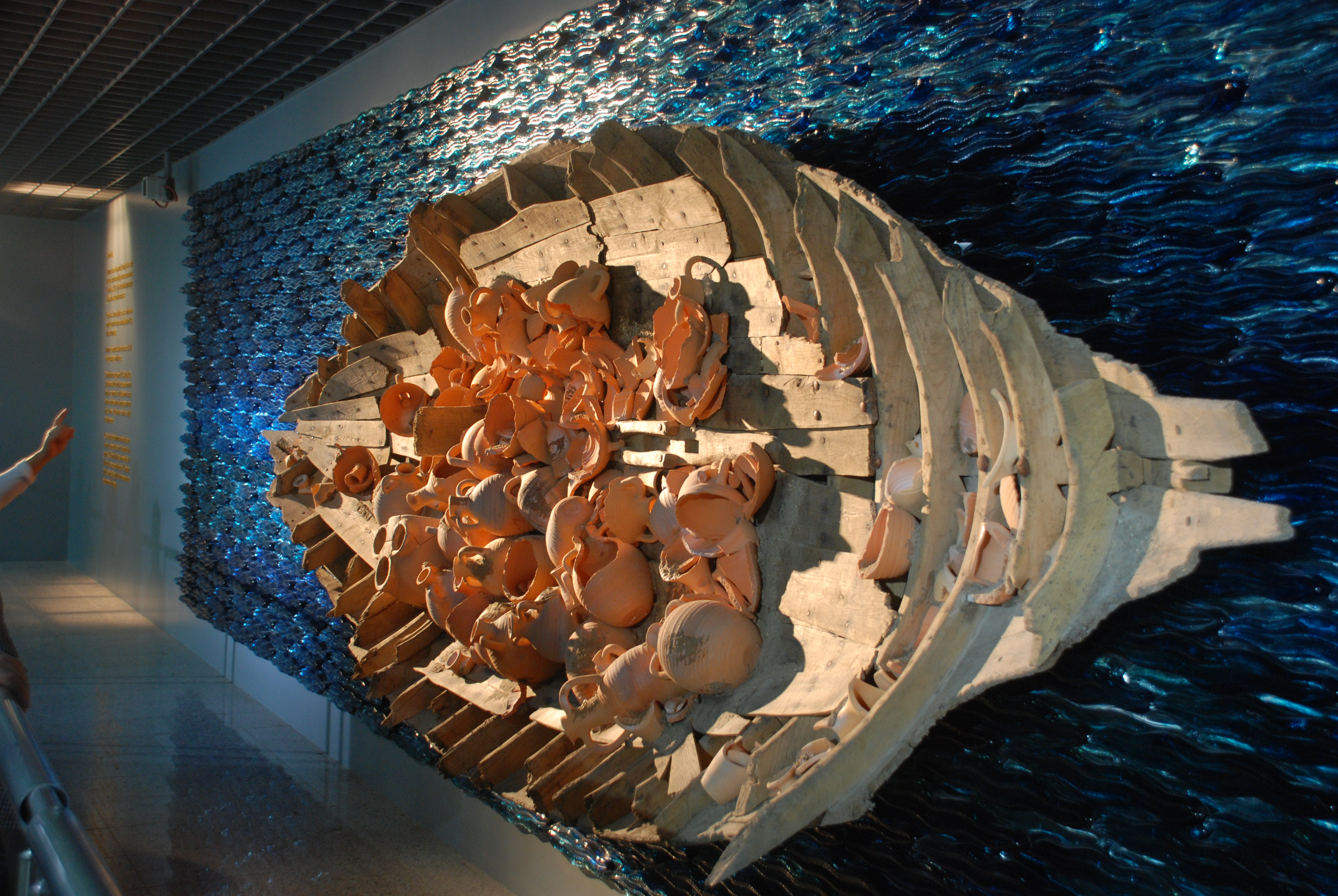 Yenikapı İstasyonunda sergilenen Antik kayık, Marmaray